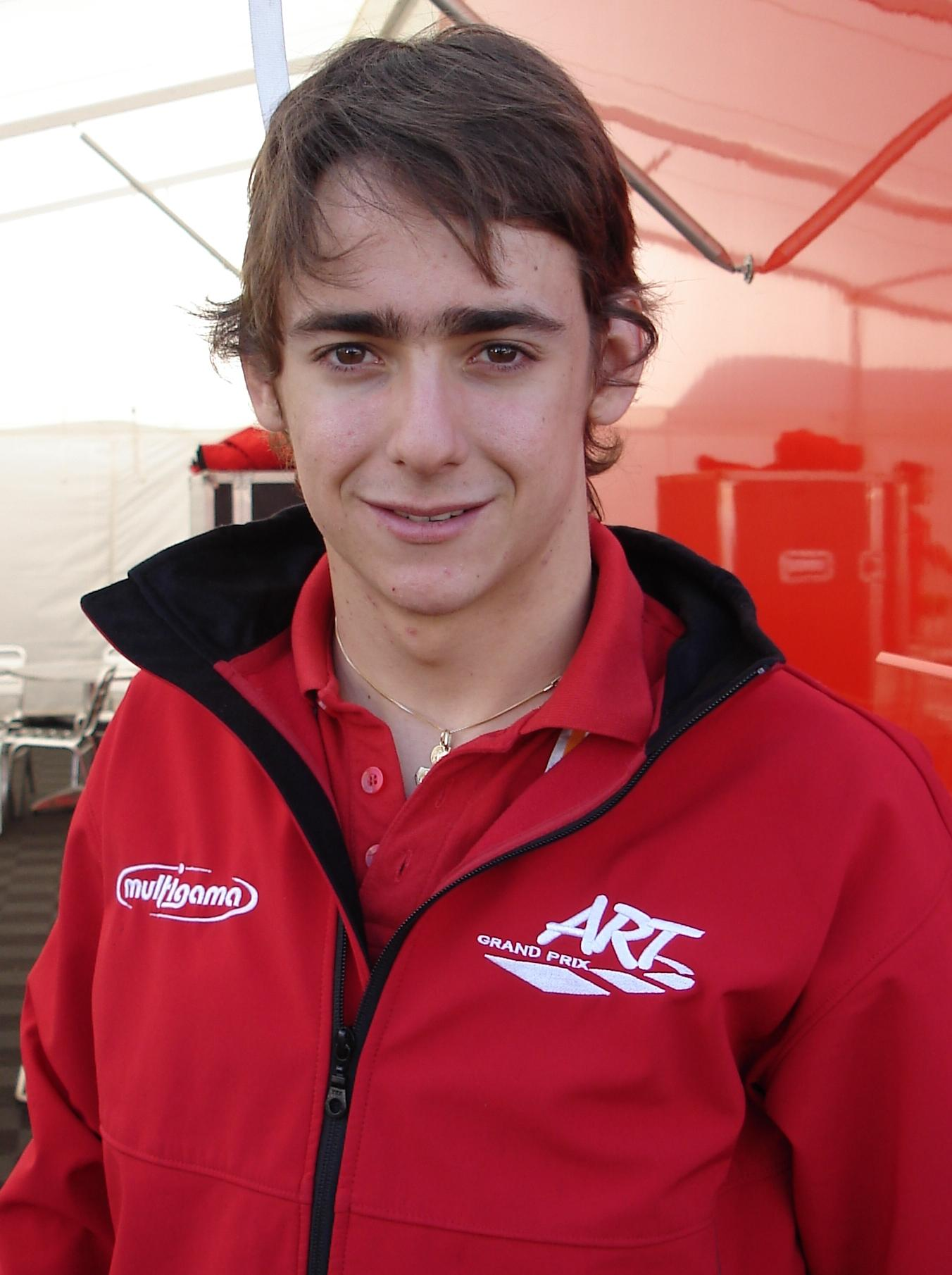 Esteban Gutiérrez, Bild entstanden im Rahmen des DTM-Rennwochenendes auf dem Hockenheimring.